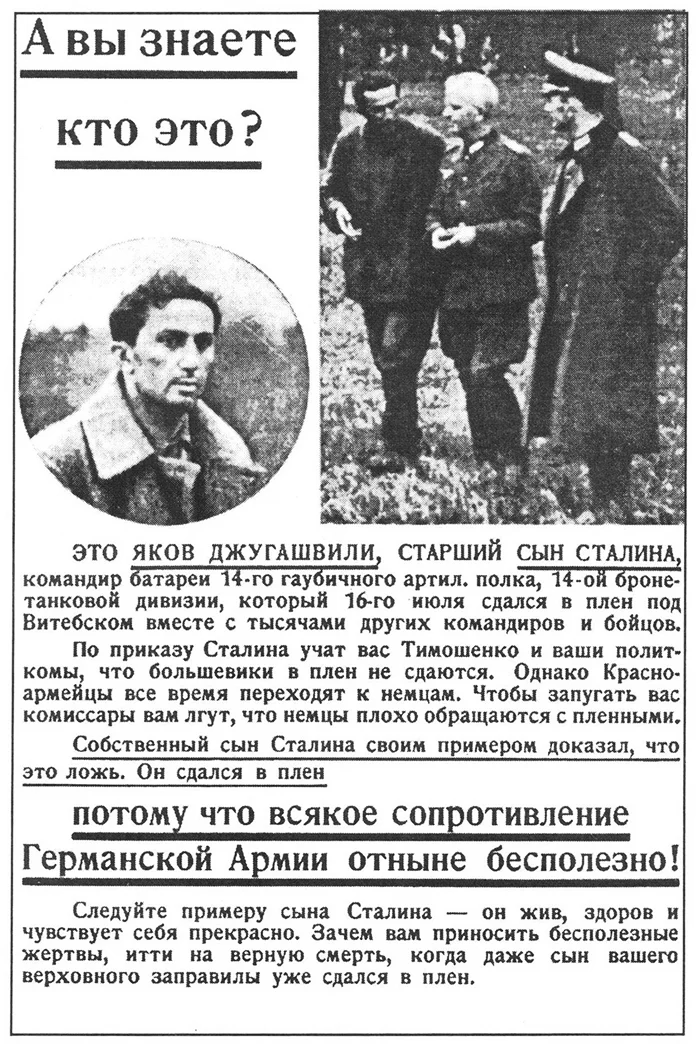 Немецкая листовка 1941 года, использовавшая Якова Джугашвили в целях пропаганды плена